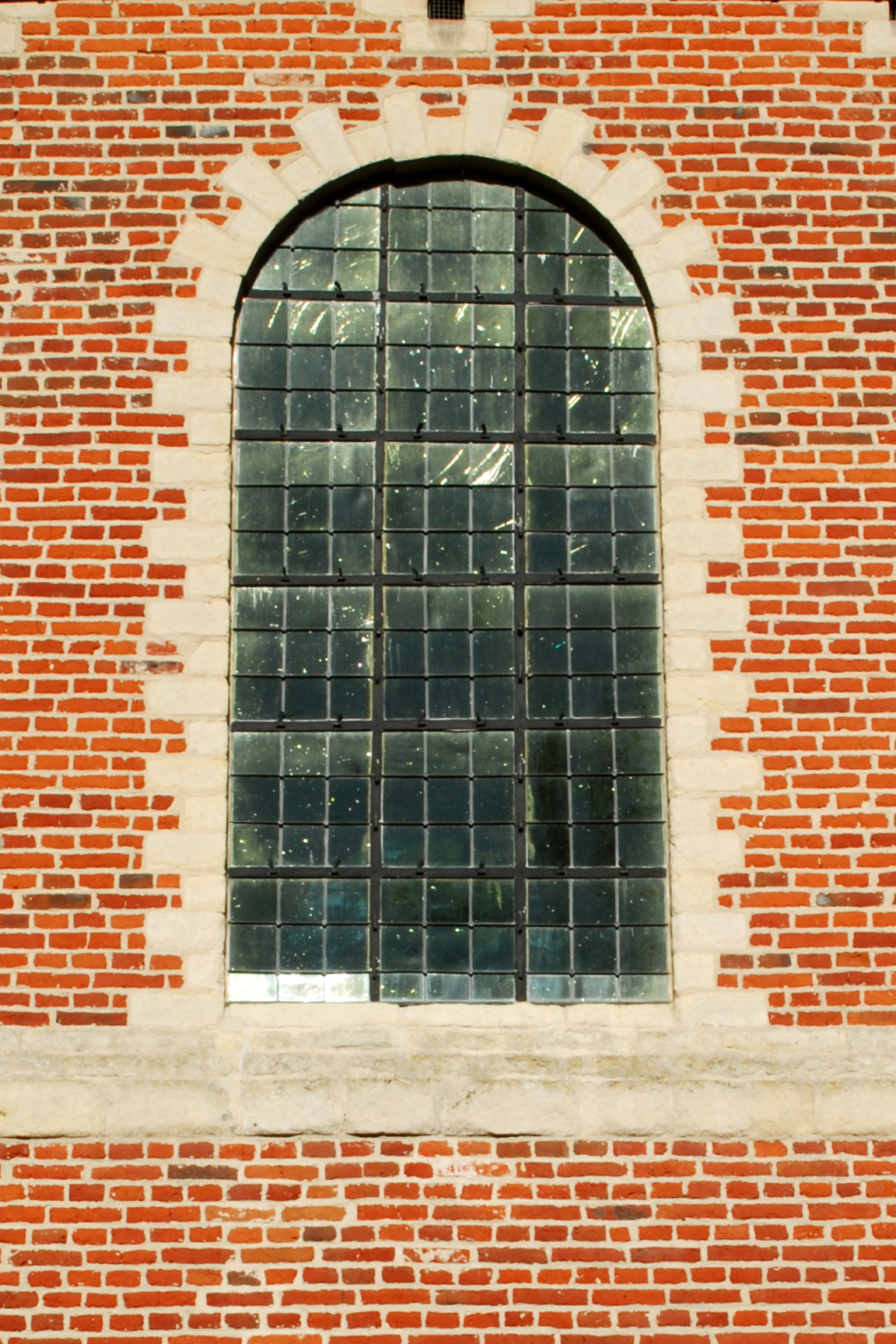 Belgique - Brabant flamand - Oud-Heverlee - Chapelle Notre-Dame de Steenbergen